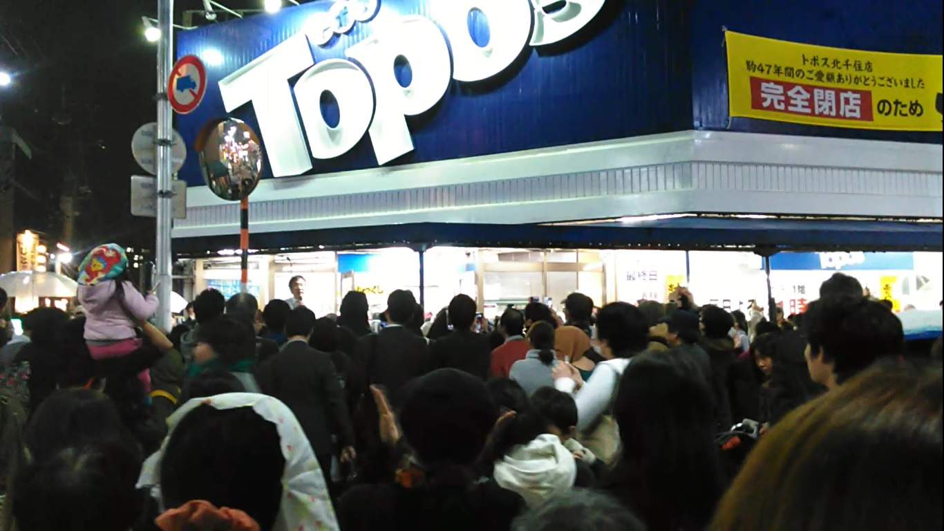 最後のトポス北千住店での閉店の様子 店員の最後の挨拶に大勢の客が集まる。